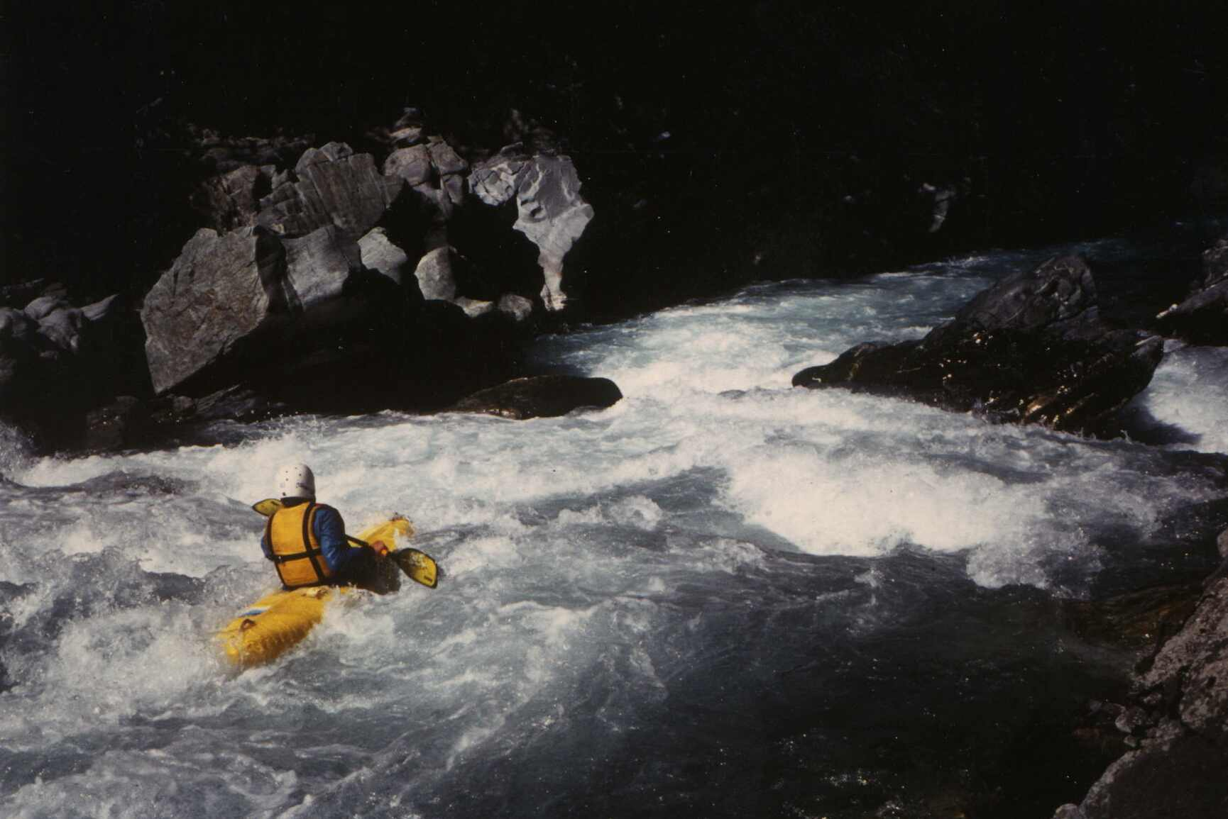 Glenner, Graubünden